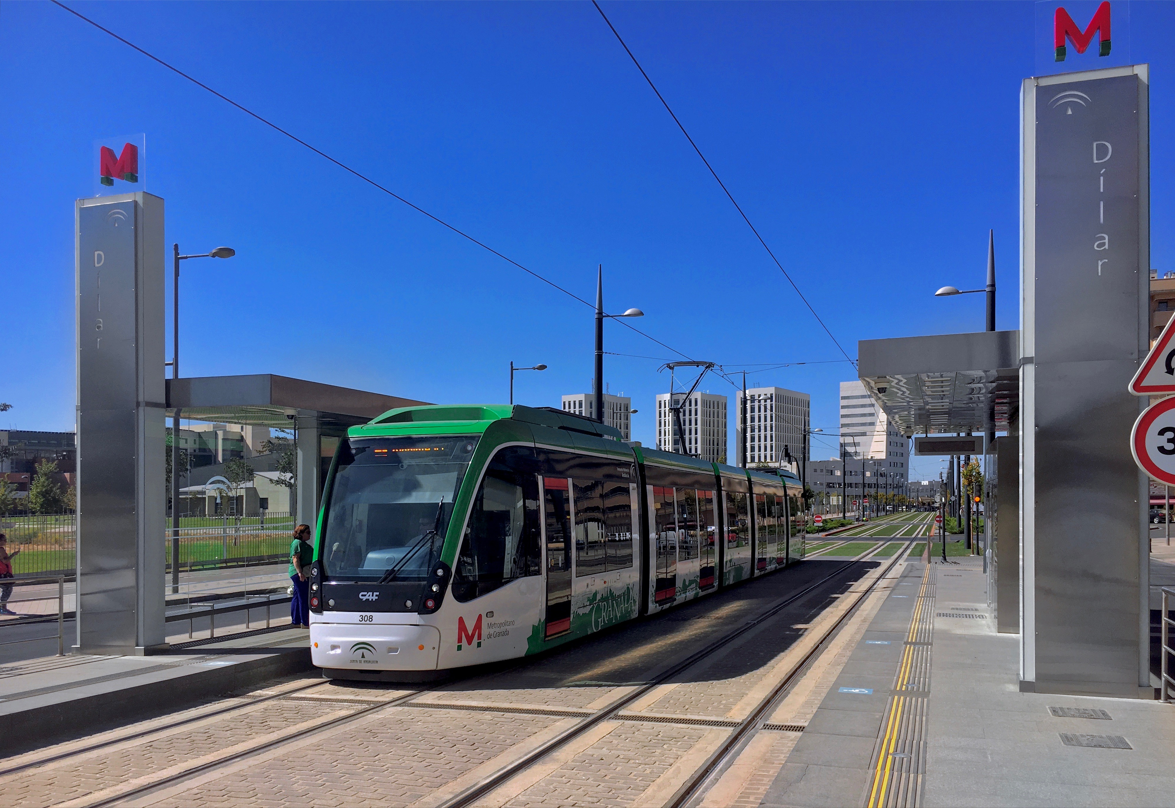 Estación de Dílar del Metro de Granada.